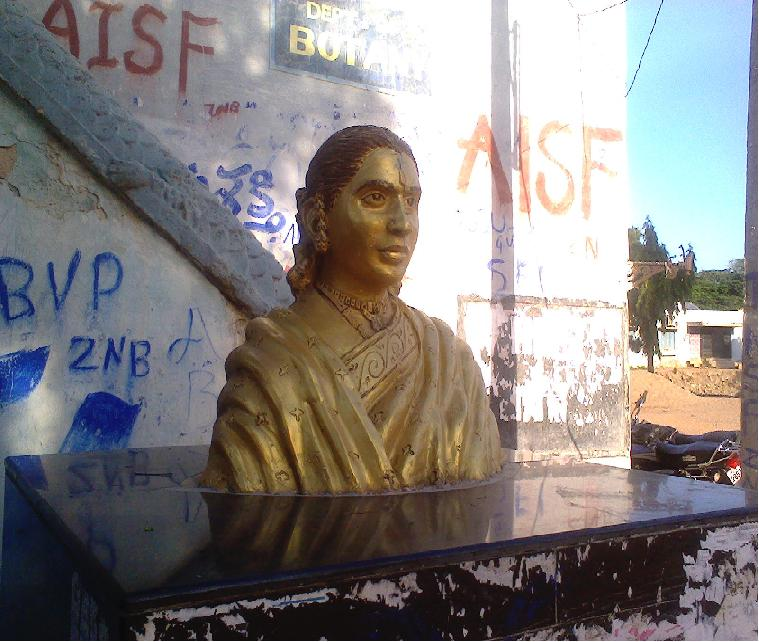 మహారాణి ఆదిలక్ష్మిదేవమ్మ